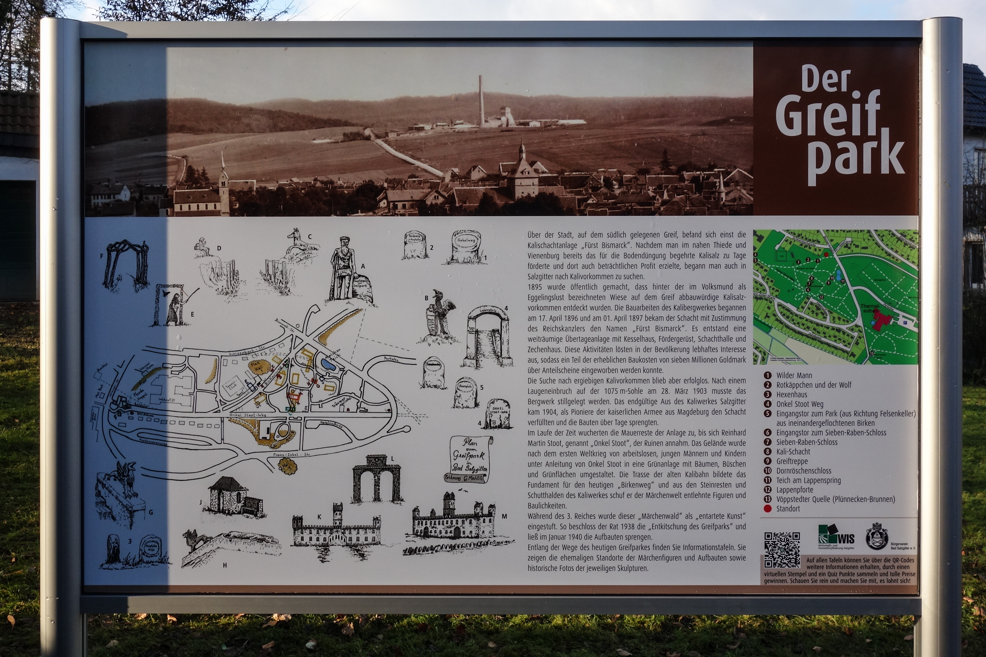 Greifpark in Salzgitter-Bad: Informationstafel am Eingang zum Park